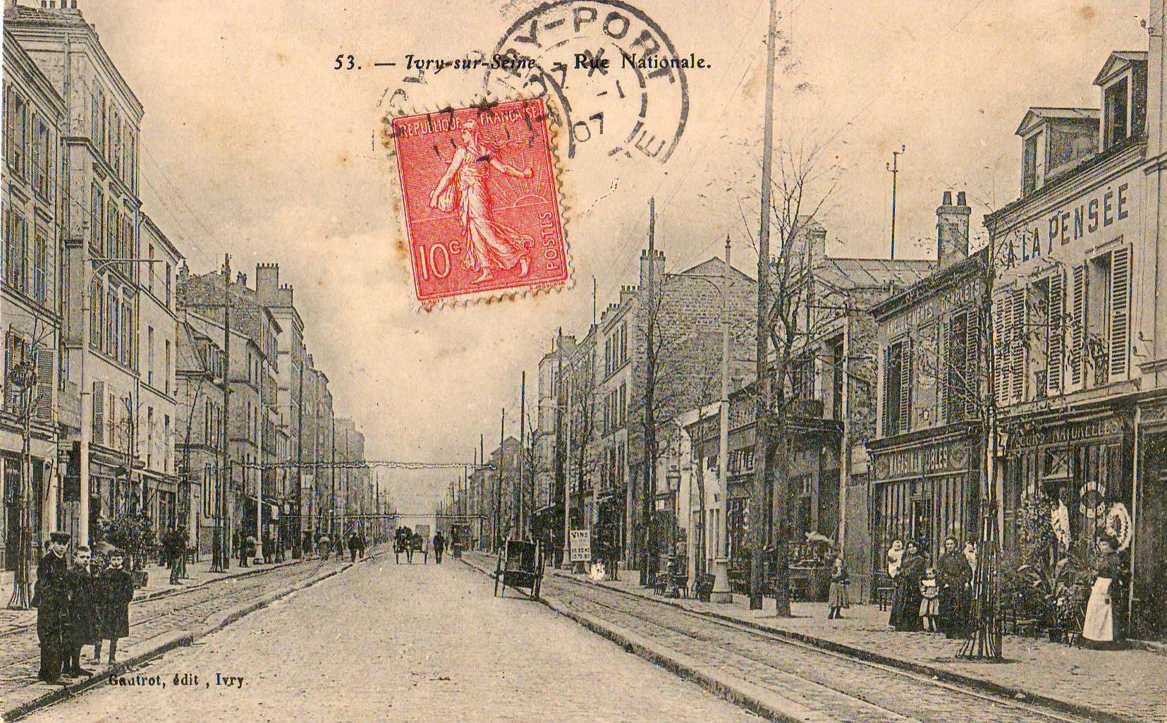 Carte postale ancienne éditée par Gautret, éditeur à Ivry, n°53 :IVRY-SUR-SEINE - Rue nationale